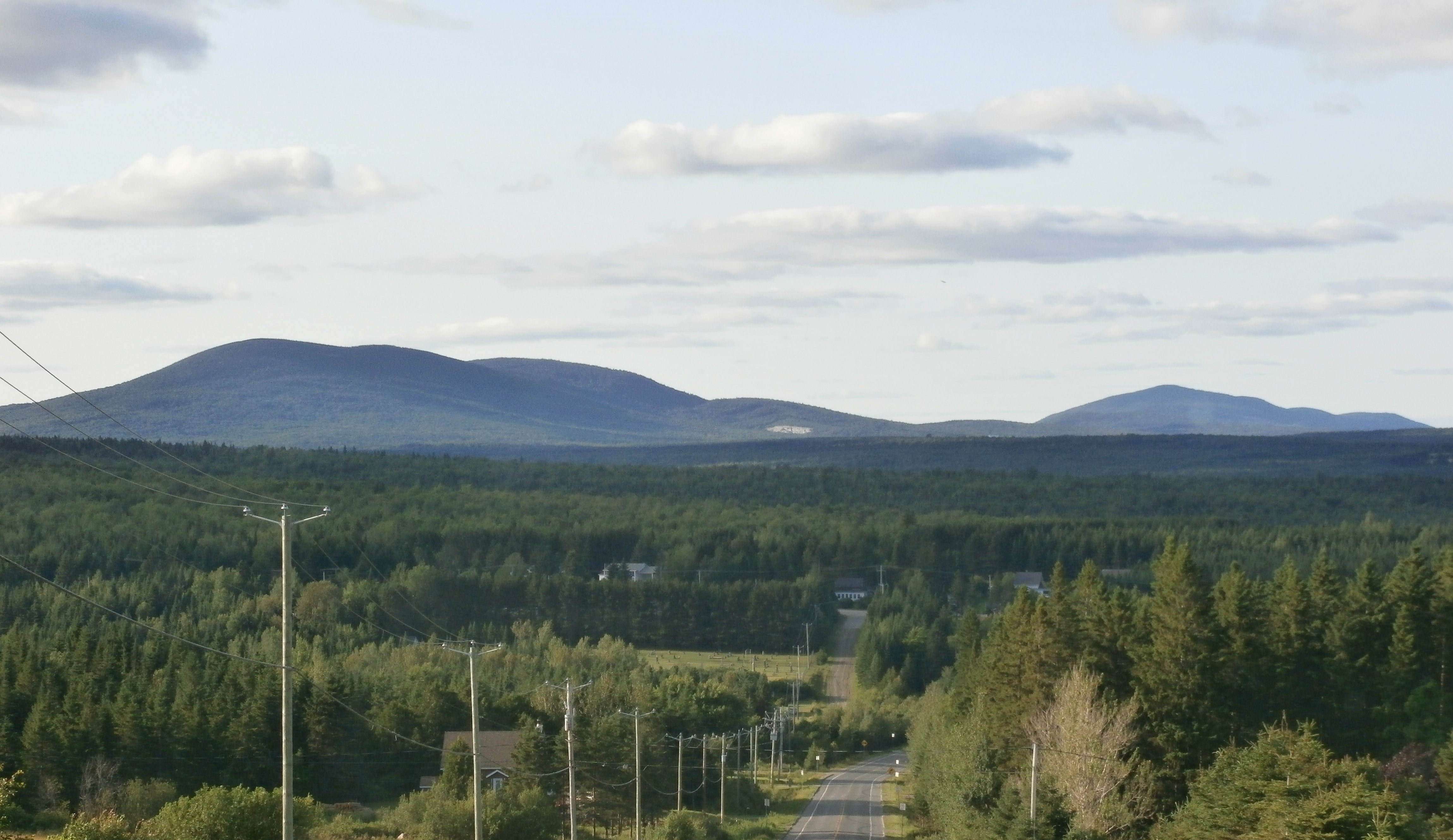 Mont Sainte-Cécile et Morne de Saint-Sébastien (caractéristiques géologiques de cette intrusion dévonienne (362 Ma) appelée Pluton de Saint-Sébastien–Sainte-Cécile. La roche est grise et le grain varie de moyen à grossier.